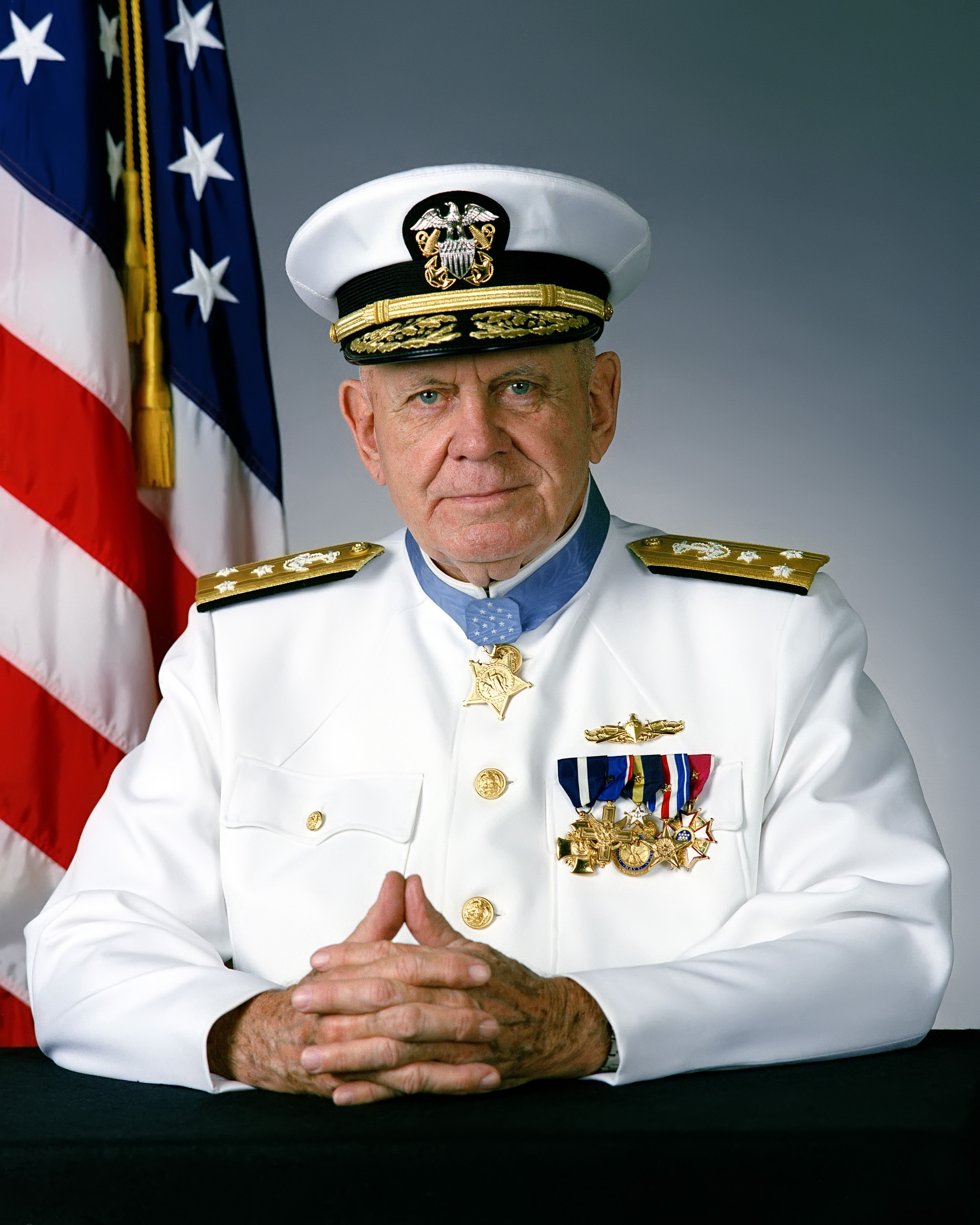 VADM John D. Bulkeley, U.S. Navy